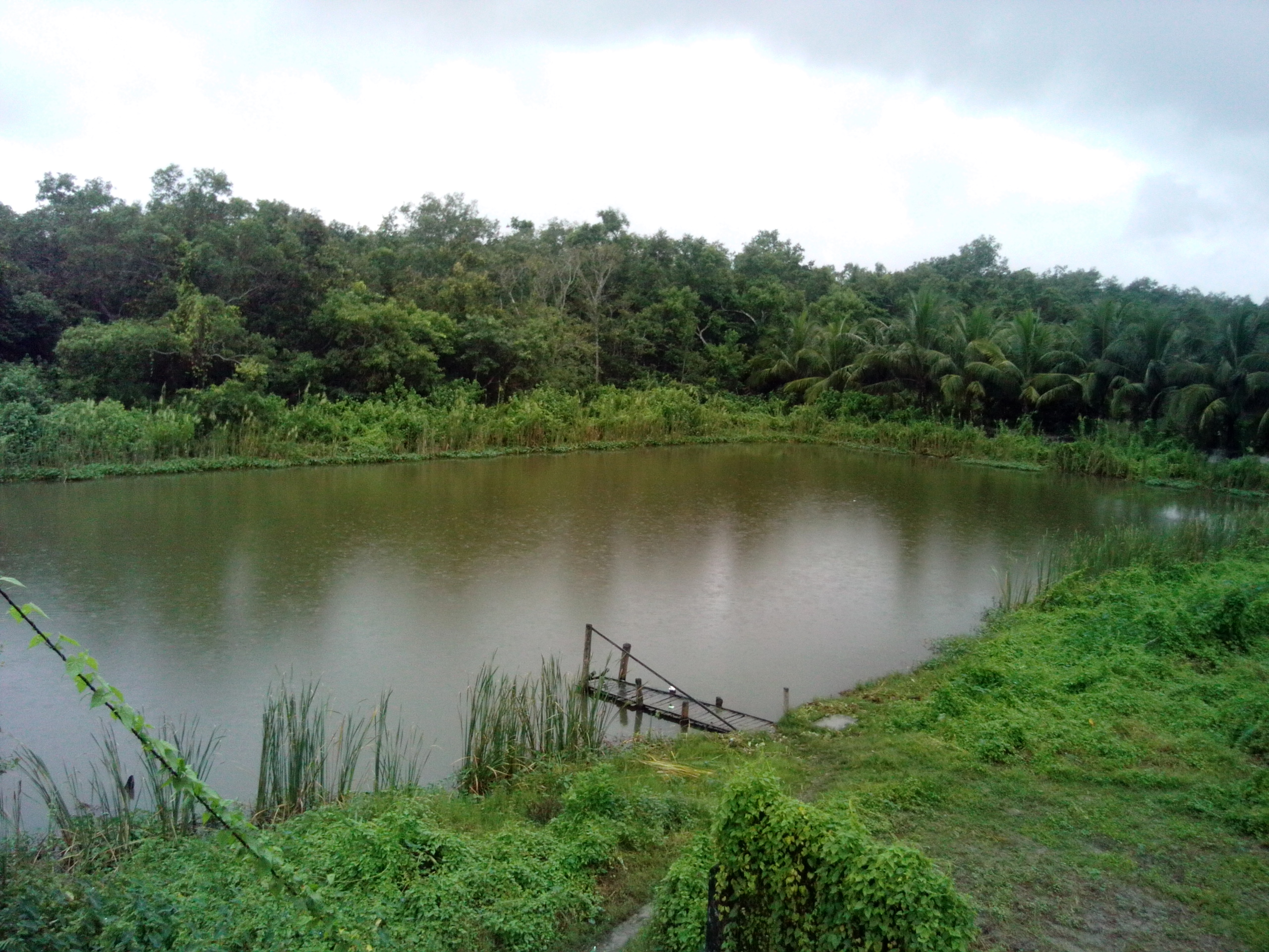 করমজল, সুন্দরবন দক্ষিণ বন্যপ্রাণী অভয়ারণ্য